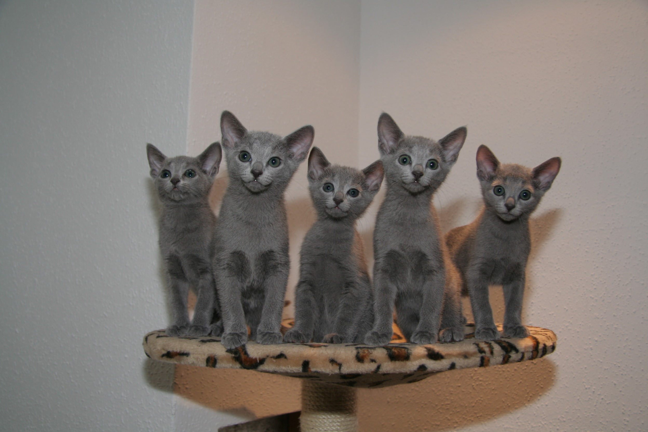 Russisch Blau Kitten